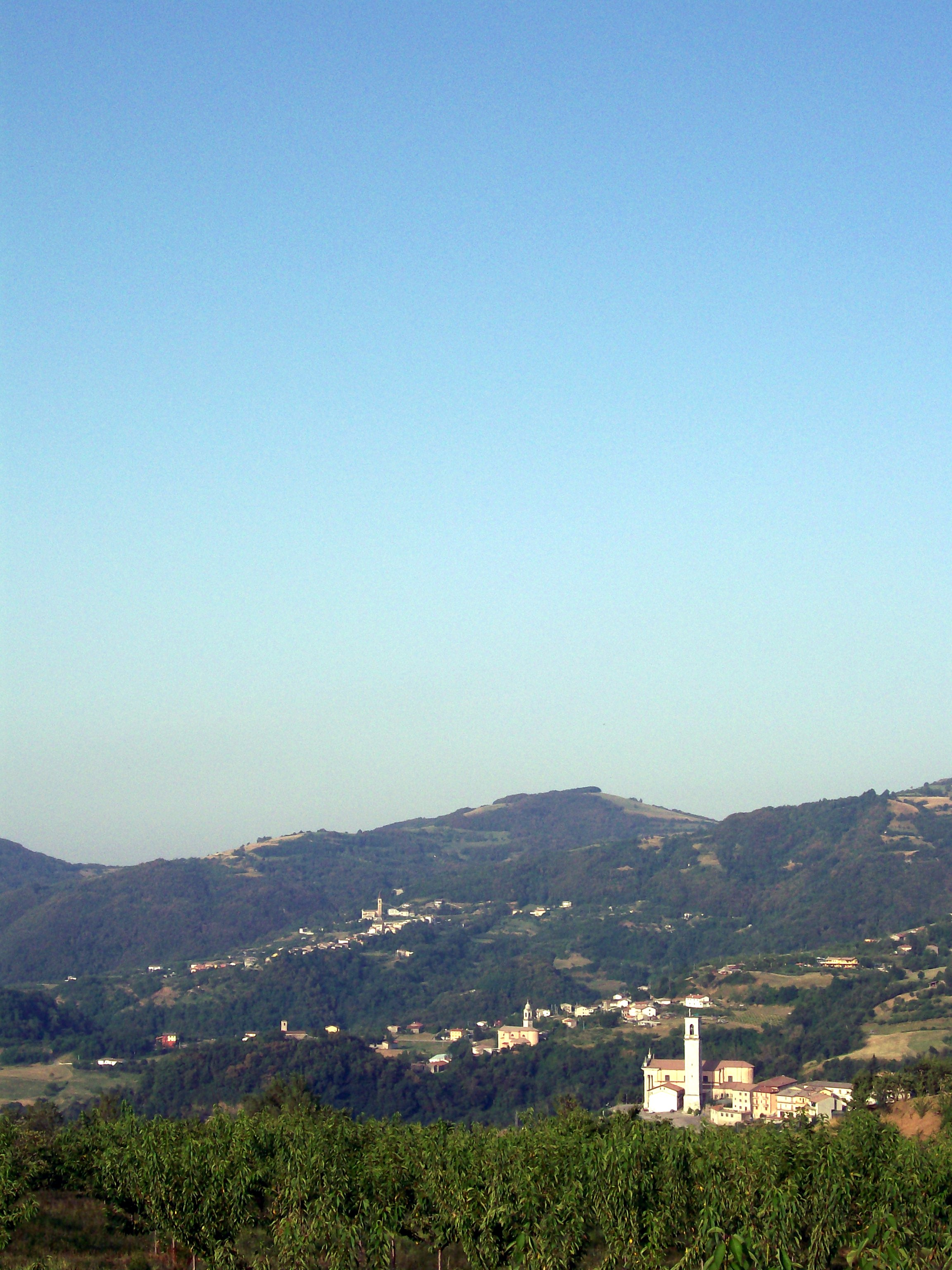 Panorama con vista della pieve di S. Antonio e delle chiese parrocchiali di Vestenanova, Vestenavecchia e Castelvero.